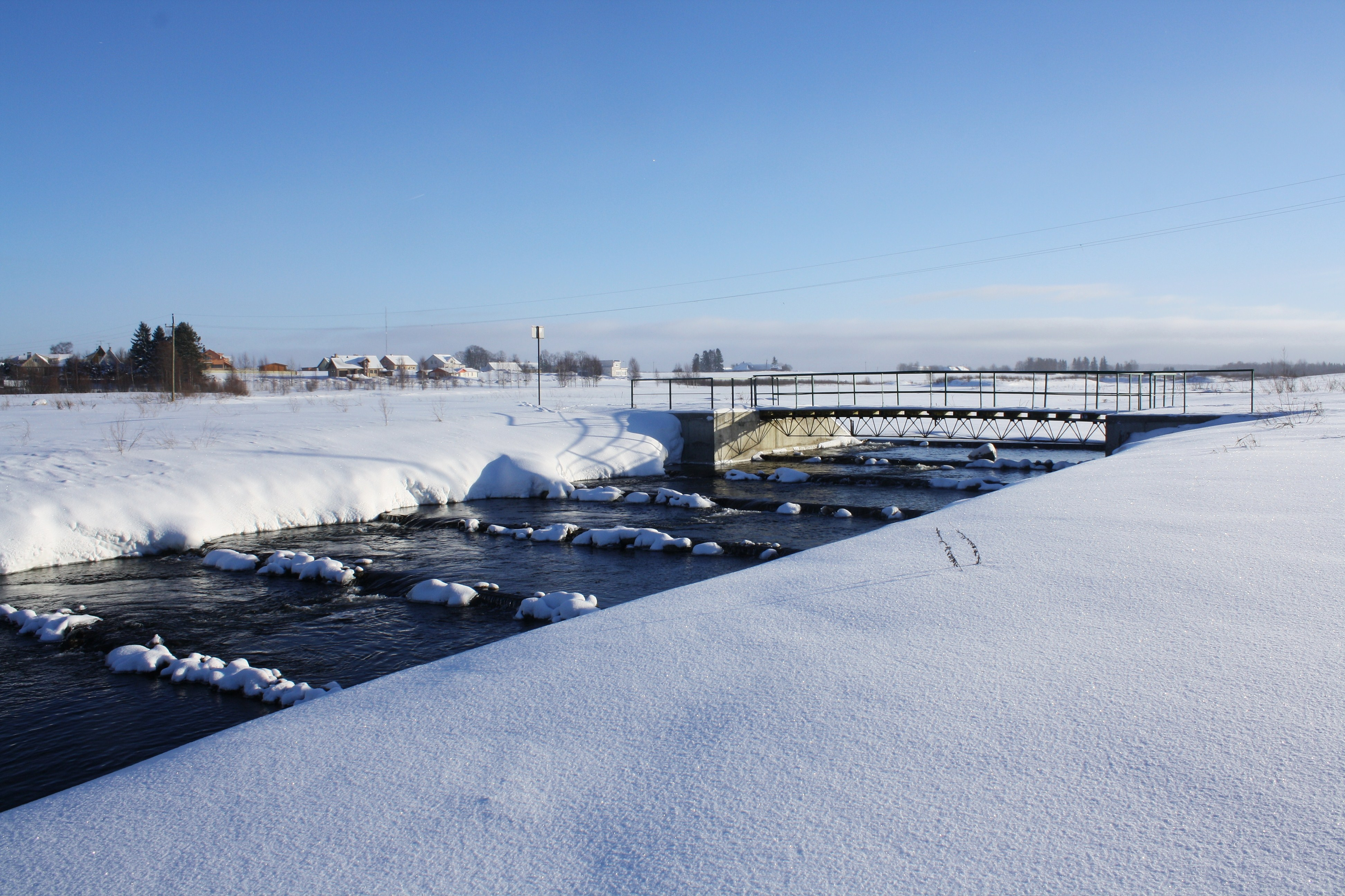 Loobu jõele ehitatud kalatrepp